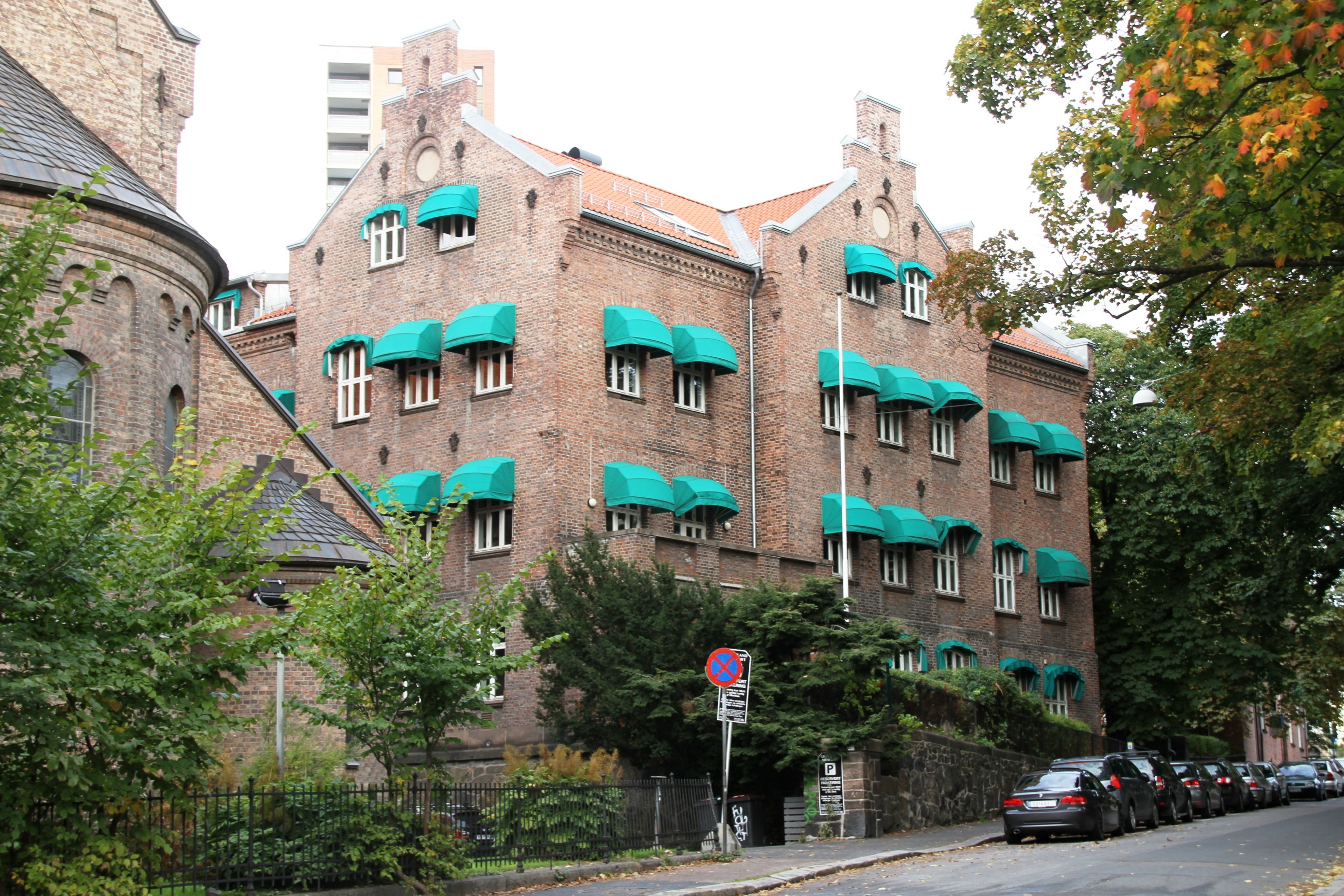 Tidligere Fernanda Nissens vdg skole, nå FaFo, Grønland - Oslo